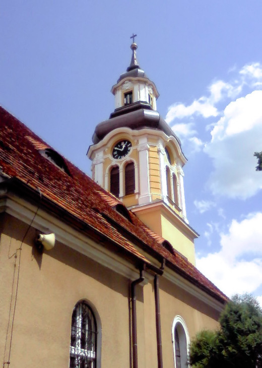 Książ Wielkopolski, kościół.